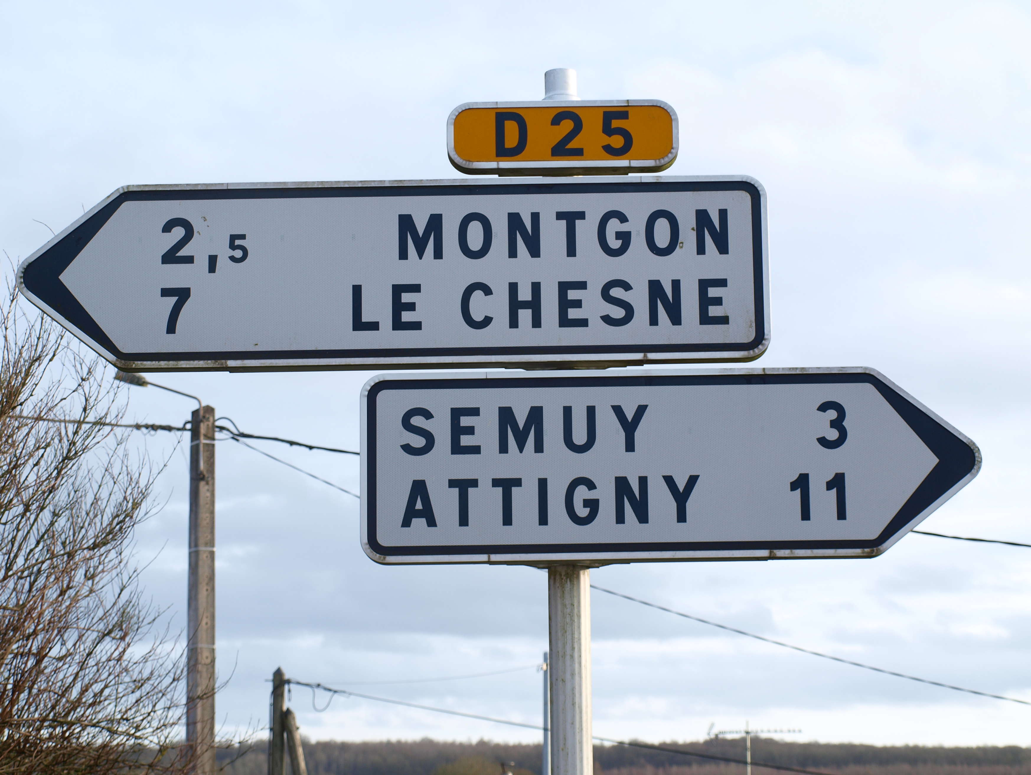 Neuville-Day (Ardennes, France) ; panneaux itinéraires.